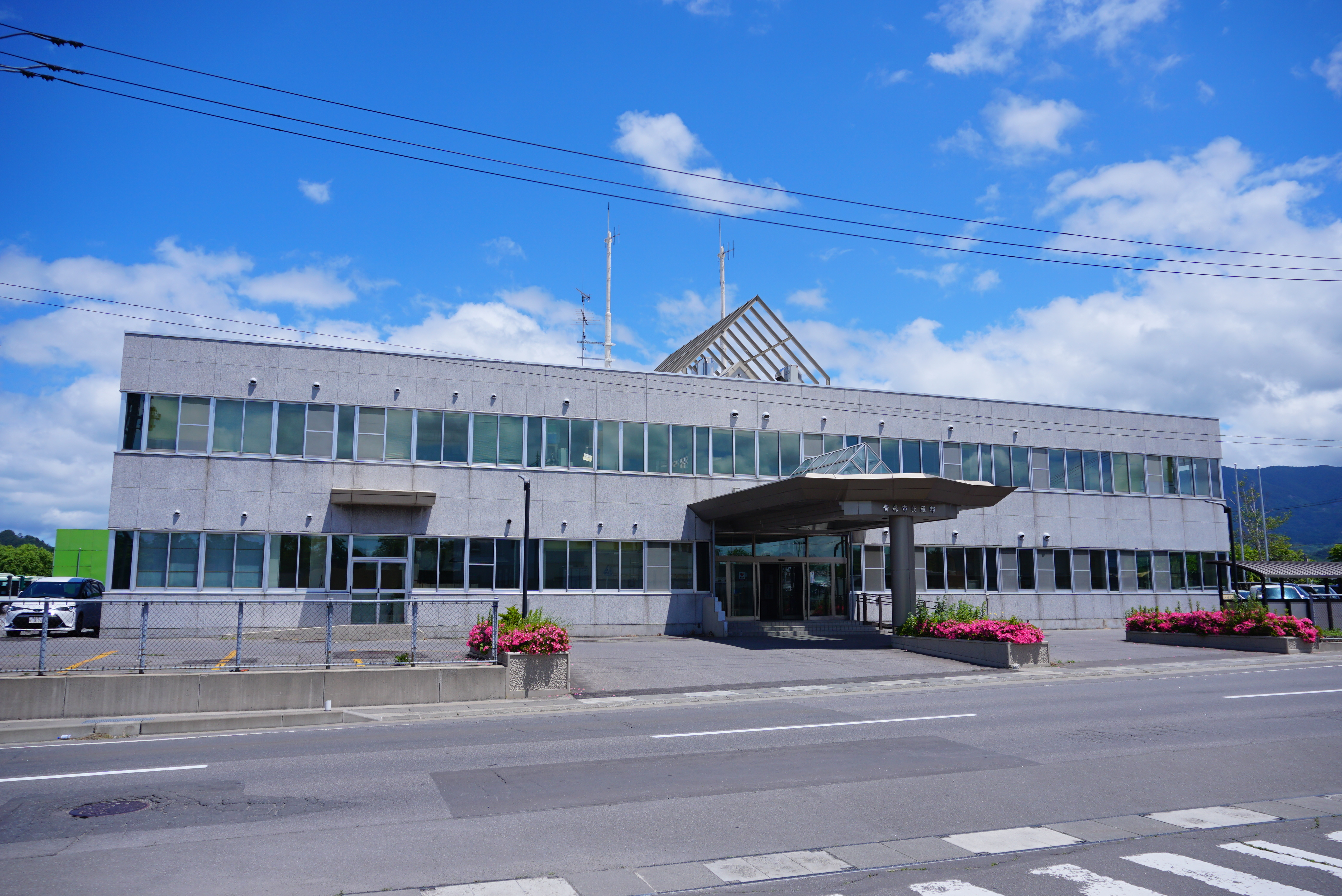 青森市企業局交通部／青森市営バス東部営業所。青い森鉄道・野内駅至近に位置する。